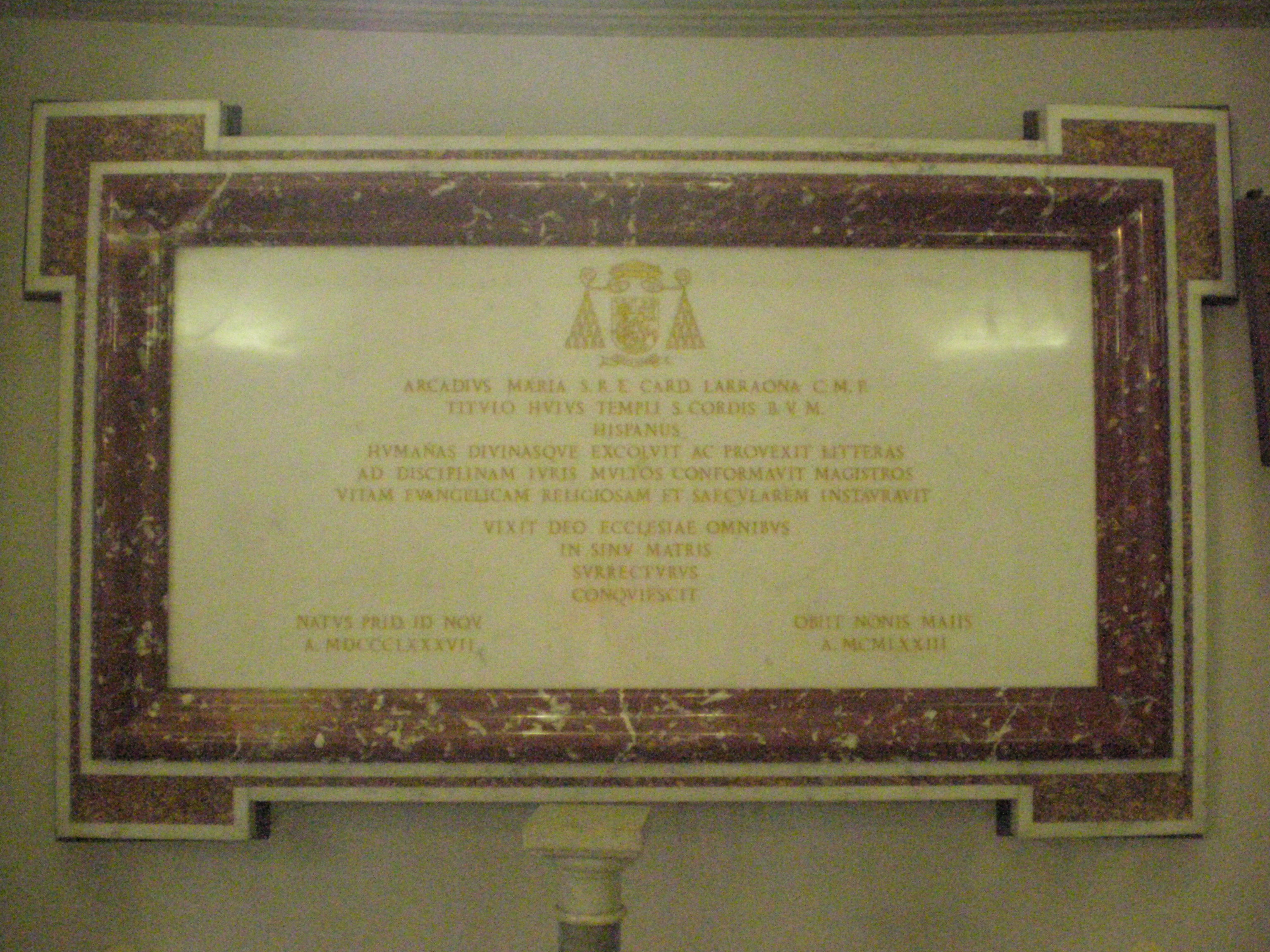 Lauda sepulcral d'Arcadio María cardenal Larraona y Saralegui a la capella de Sant Josep Artesà de la basílica del Sagrat Cor Immaculat de María (Roma), de la qual fou cardenal prevere titular. — Laude sepulcral de Arcadio María cardenal Larraona y Saralegui en la capilla de San José Artesano de la basílica del Sagrado Corazón Inmaculado de María (Roma), de la que fue cardenal presbítero titular.